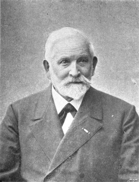 Hornjoserbsce: Jan Radyserb-Wjela (1822–1907); serbski wučer, basnik a spisowaćel.